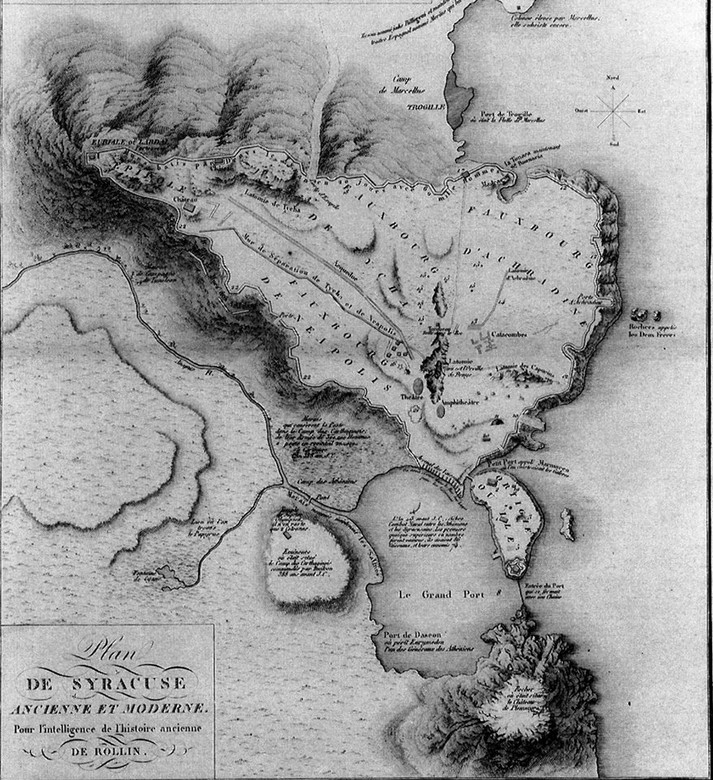 Plan de Syracuse Ancienne et Moderne